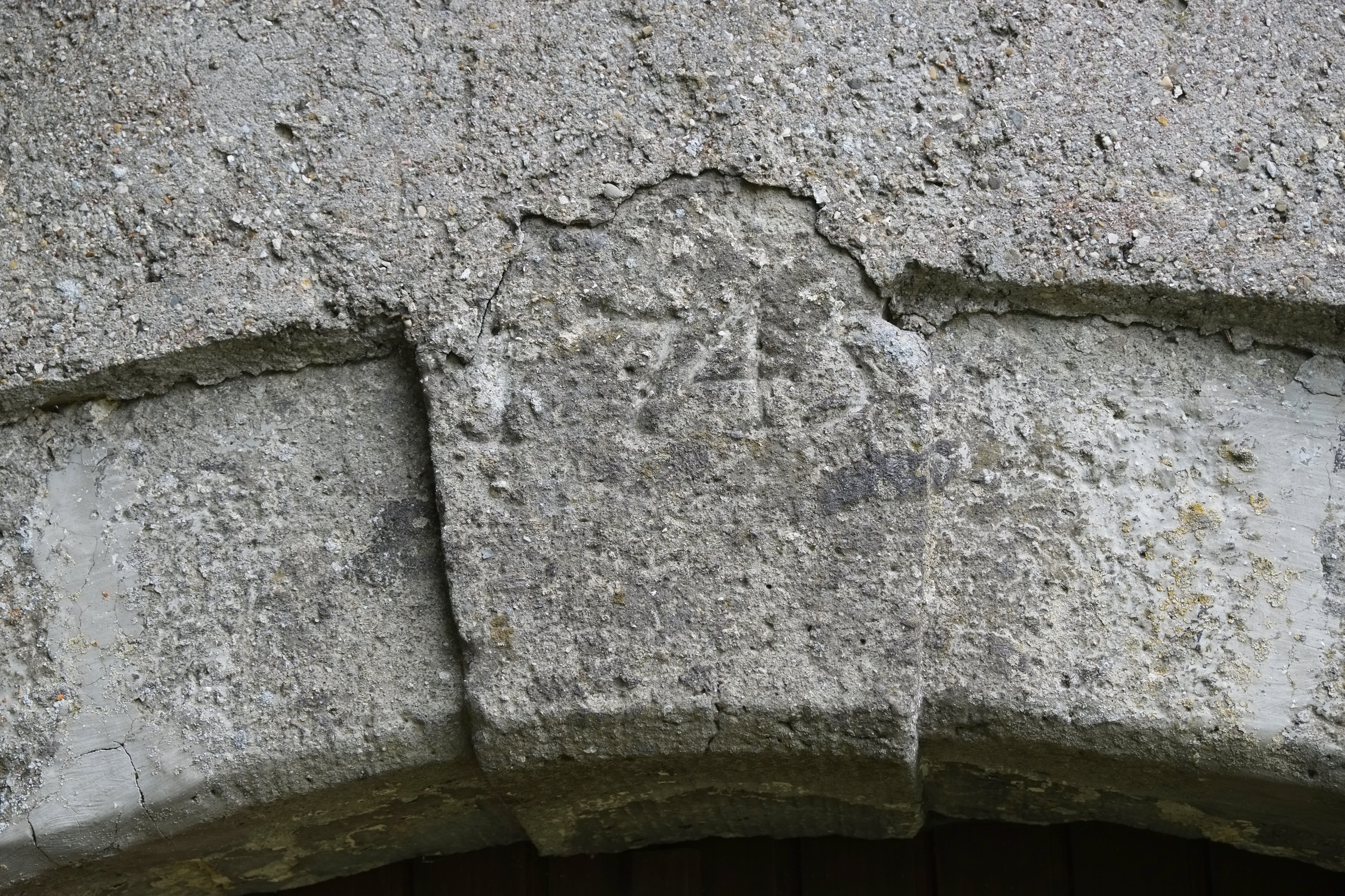 Taharahaus auf dem jüdischen Friedhof in Harburg im Landkreis Donau-Ries (Bayern)